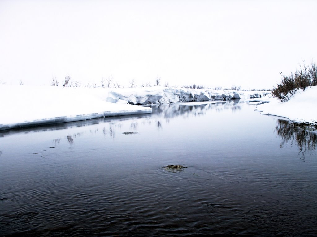 Ныгчеквеем в мае